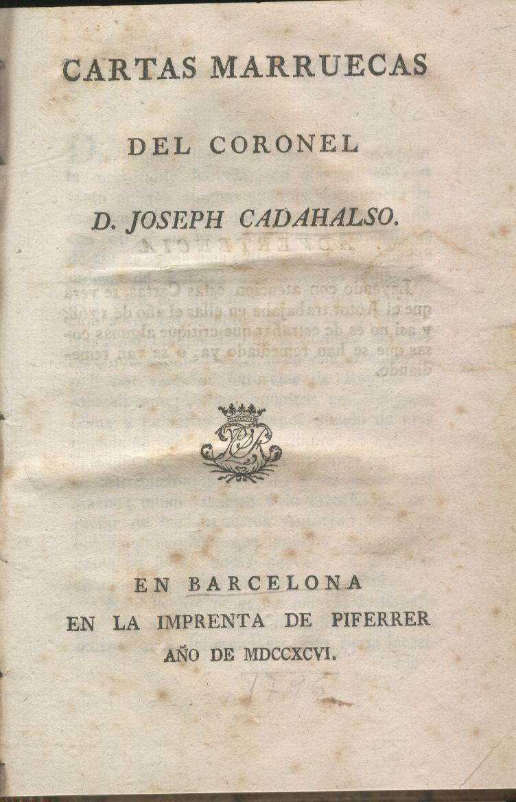 Edición de las Cartas Marruecas, de José Cadalso, año 1796.